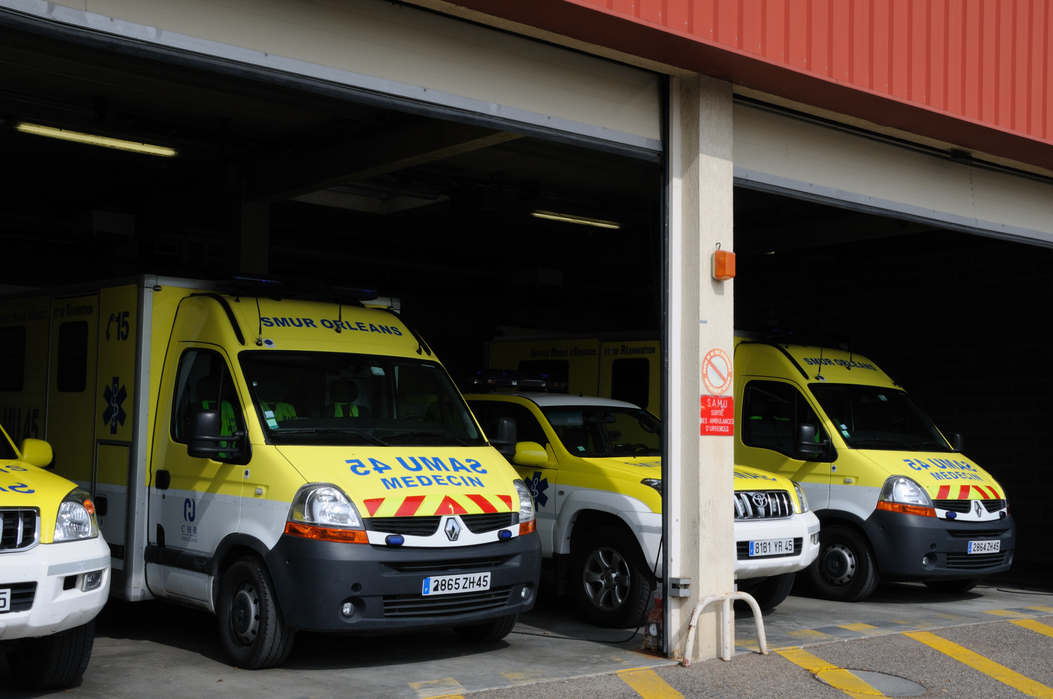 Véhicules du SAMU, Hôpital d'Orléans-la-Source, Loiret, France